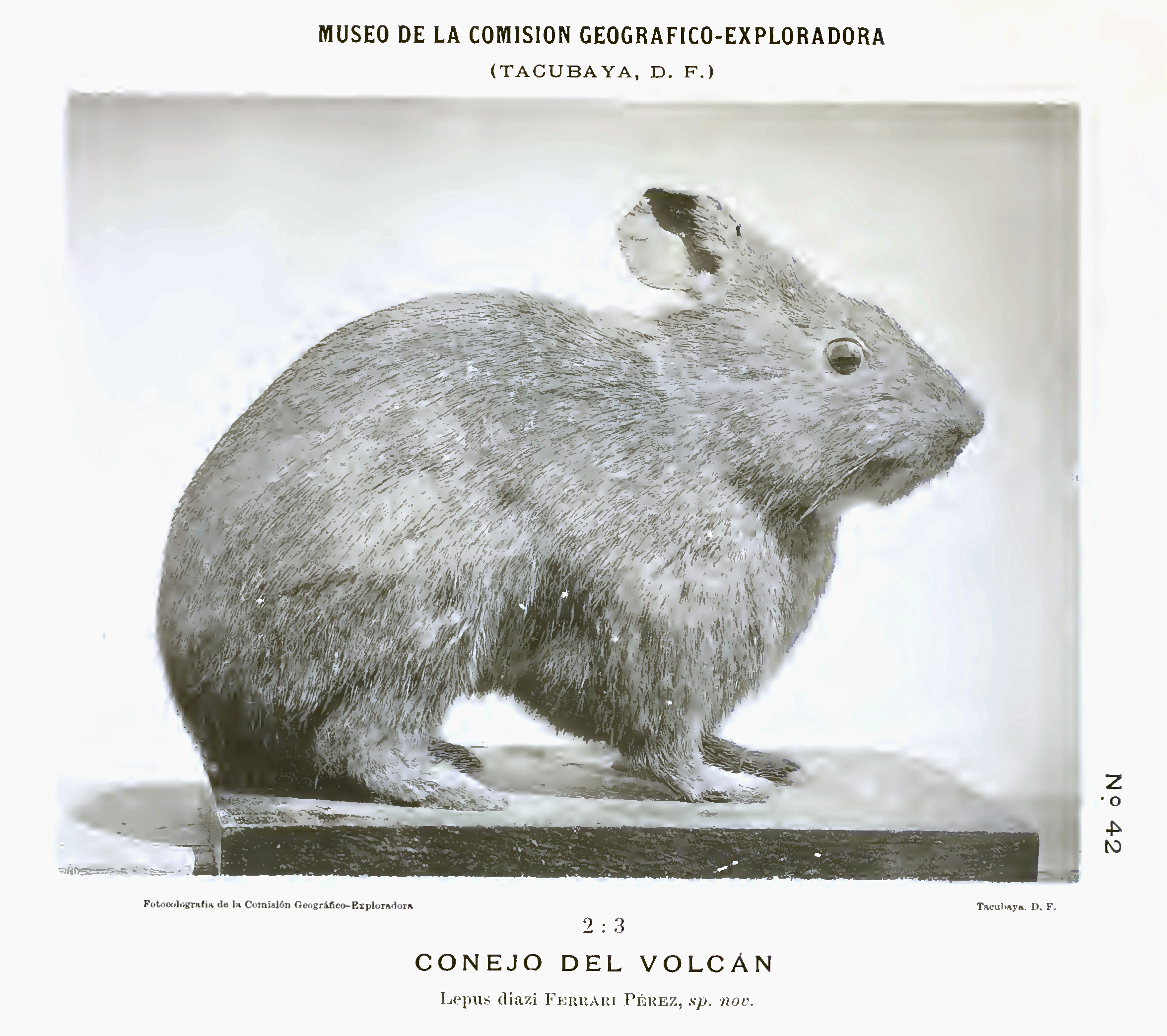 Lepus diazi, Darstellung der Art in der Erstbeschreibung von Ferrari-Pérez, In: Augustín Dáz: Catálogo de los objetos que componen el contingente de la Comisión, precedido de algunas notas sobre su organización y trabajos. Comision Geografico Exploradora, Republica Mexicana, Mexico, Distrito Federal, 1893 (Download bei ); Listung auf S. 23, Abbildung im Tafelwerk.